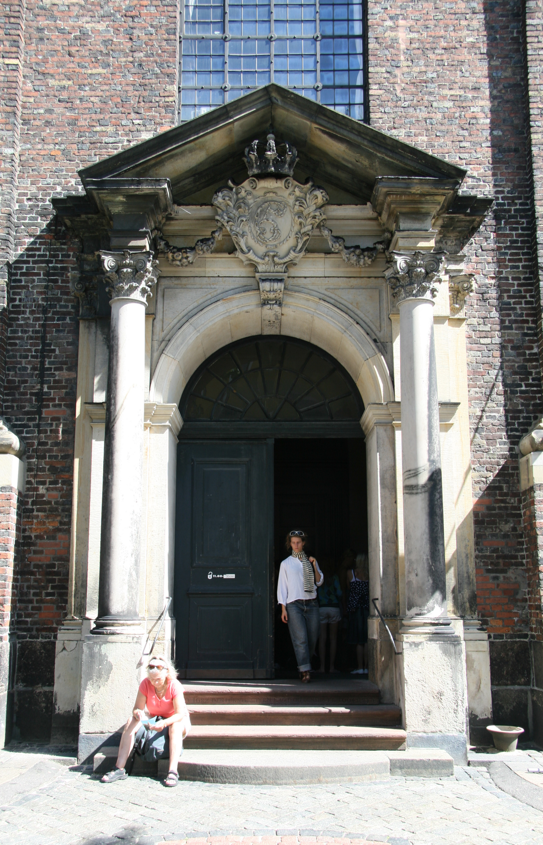 Vor Frelser Kirke (Church of Our Saviour), Copenhagen, Denmark. West portal.